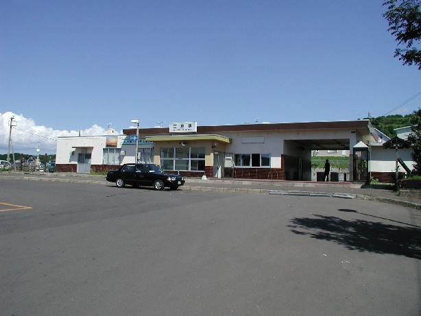 江差駅駅舎 この画像は登録者Tokyodesert自身が撮影したものである。この画像についてパブリックドメインとして提供する。